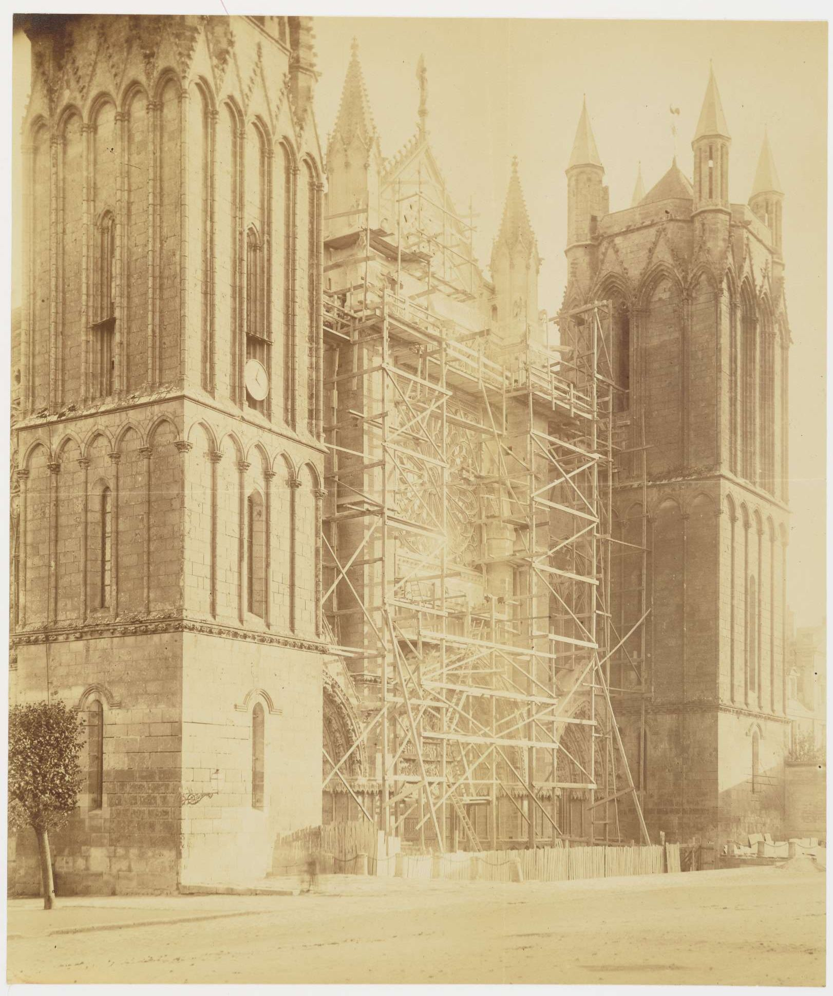 Échafaudage de la façade principale. Accompagnée d'une note de la direction des Cultes (?). Échelle : 0,2 cm / 1 m. Photographie issue des dossiers de travaux de restauration des cathédrales (1802-1912, conservés aux Archives nationales (inventaire et documents numérisés consultables en ligne).